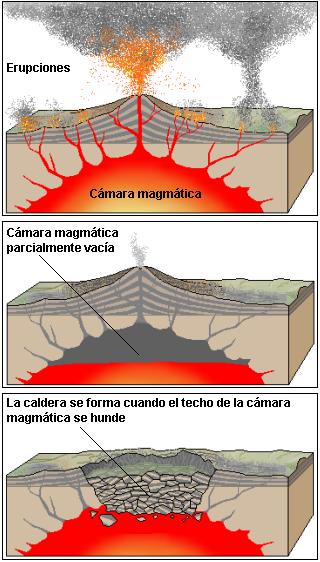 Descripción: Formación de caldera volcánica. Autor: Luis María Benítez. Enlaces relacionados: Geología, Volcanología, Domo volcánico, Lava.